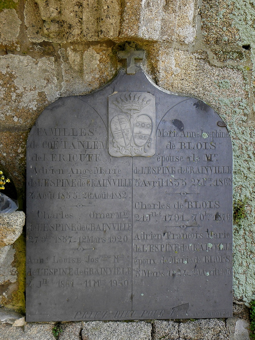 Ancienne église Saint-Maudez et Sainte-Juvette d'Henvic (29).